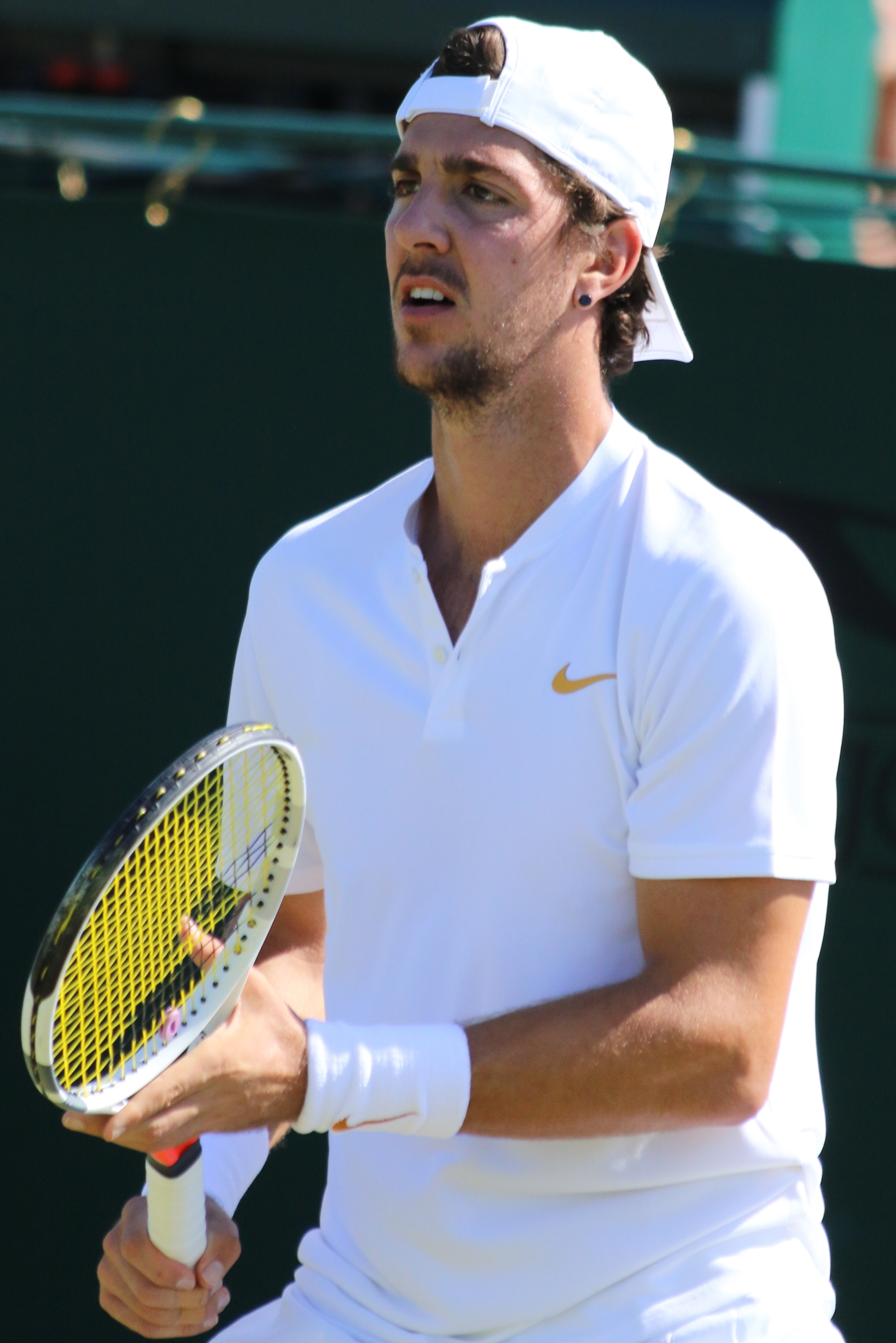 Kokkinakis WMQ18 (12)